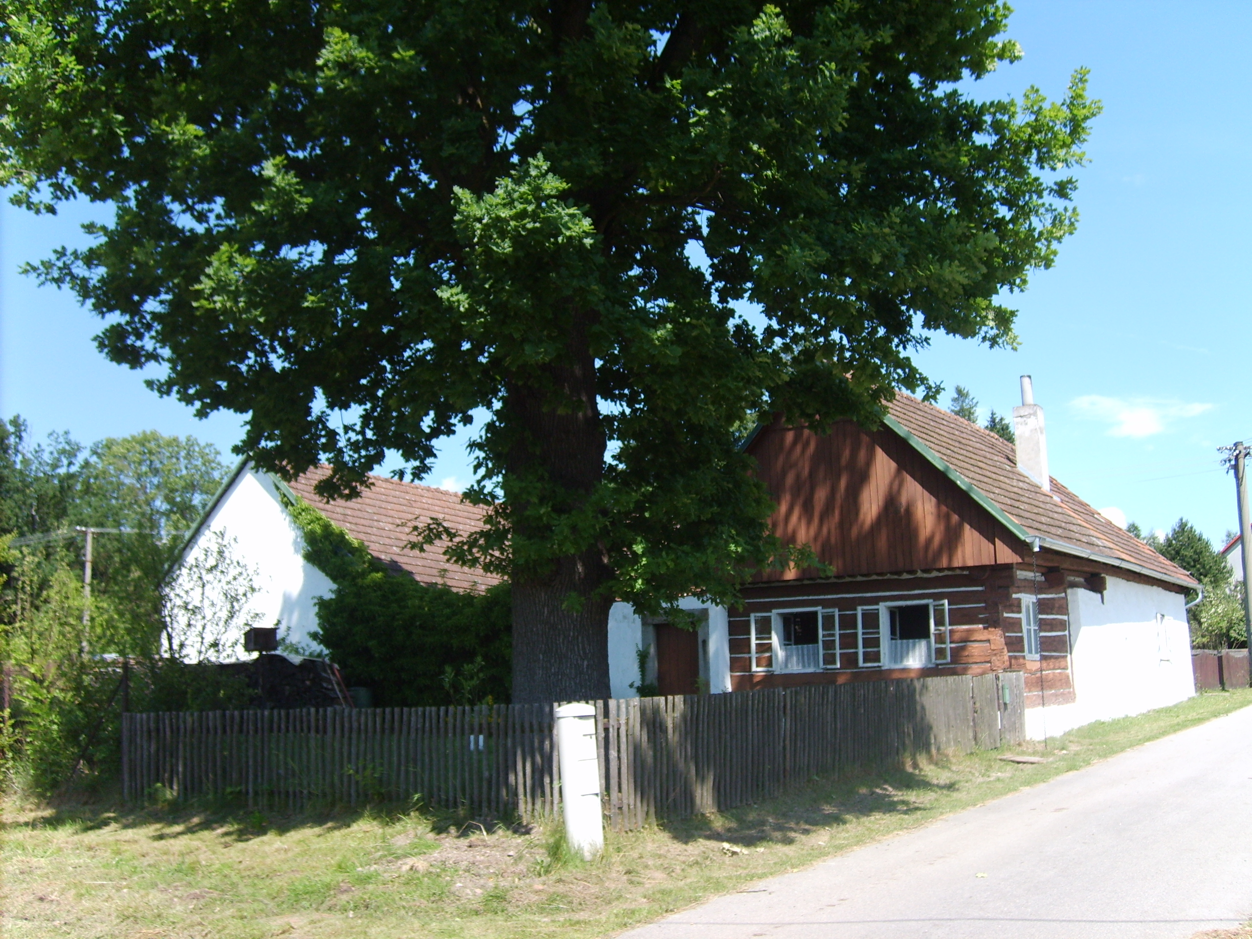 Venkovská usedlost (Roseč), ve východním koutu návsi 47, Roseč